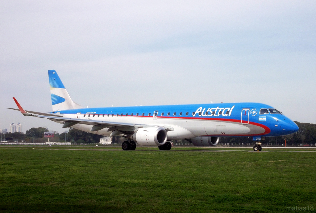 Embraer 190AR de Austral Líneas Aéreas matricula LV-CHQ con el logo de Sky Team, aguardando en el hold short de la cebecera 13 del Aeroparque Jorge Newbery en Buenos Aires, Argentina.